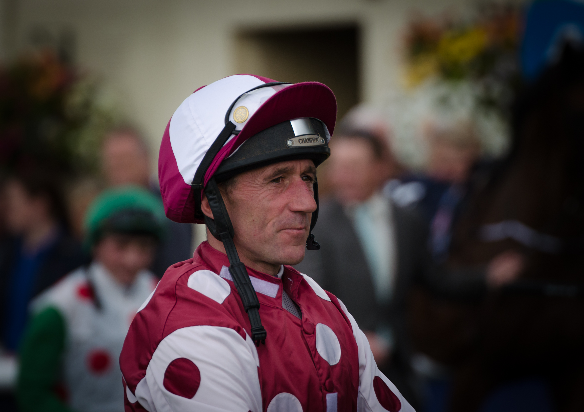 Jockey